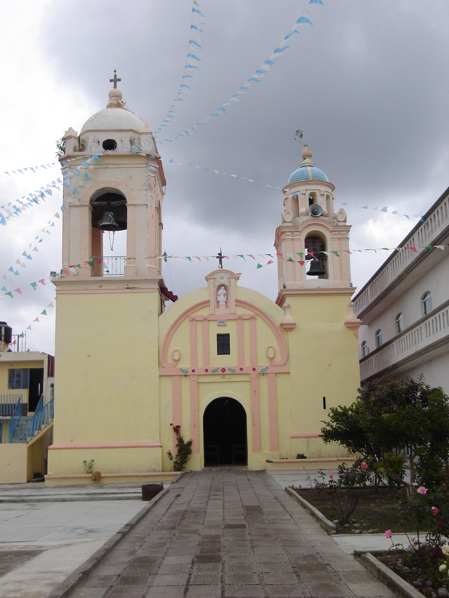 Templo católico de Santa María Atexcac, Huejotzingo, Puebla.